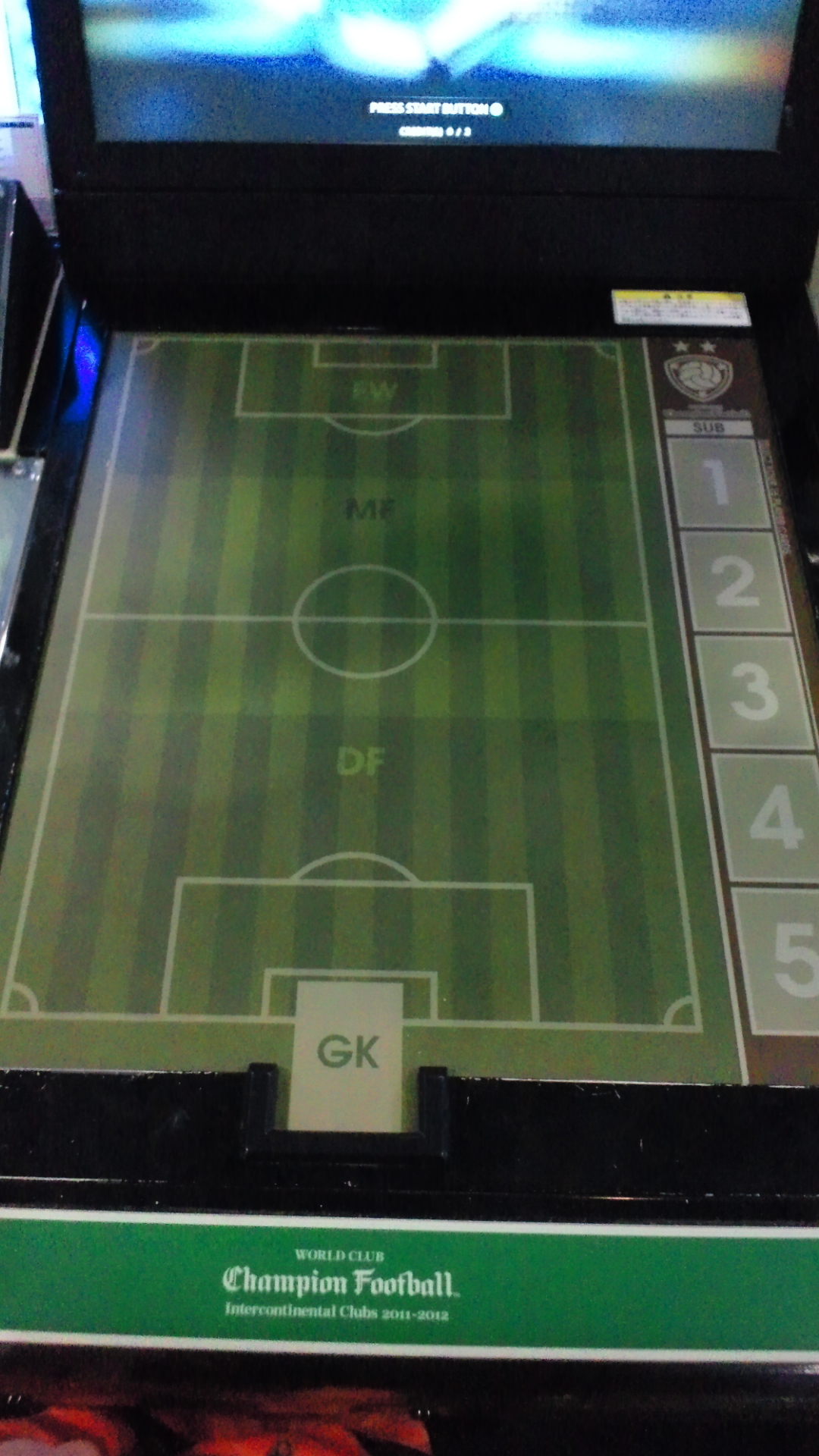 WOLD CLUB Champion Footballの選手カード配置フィールド